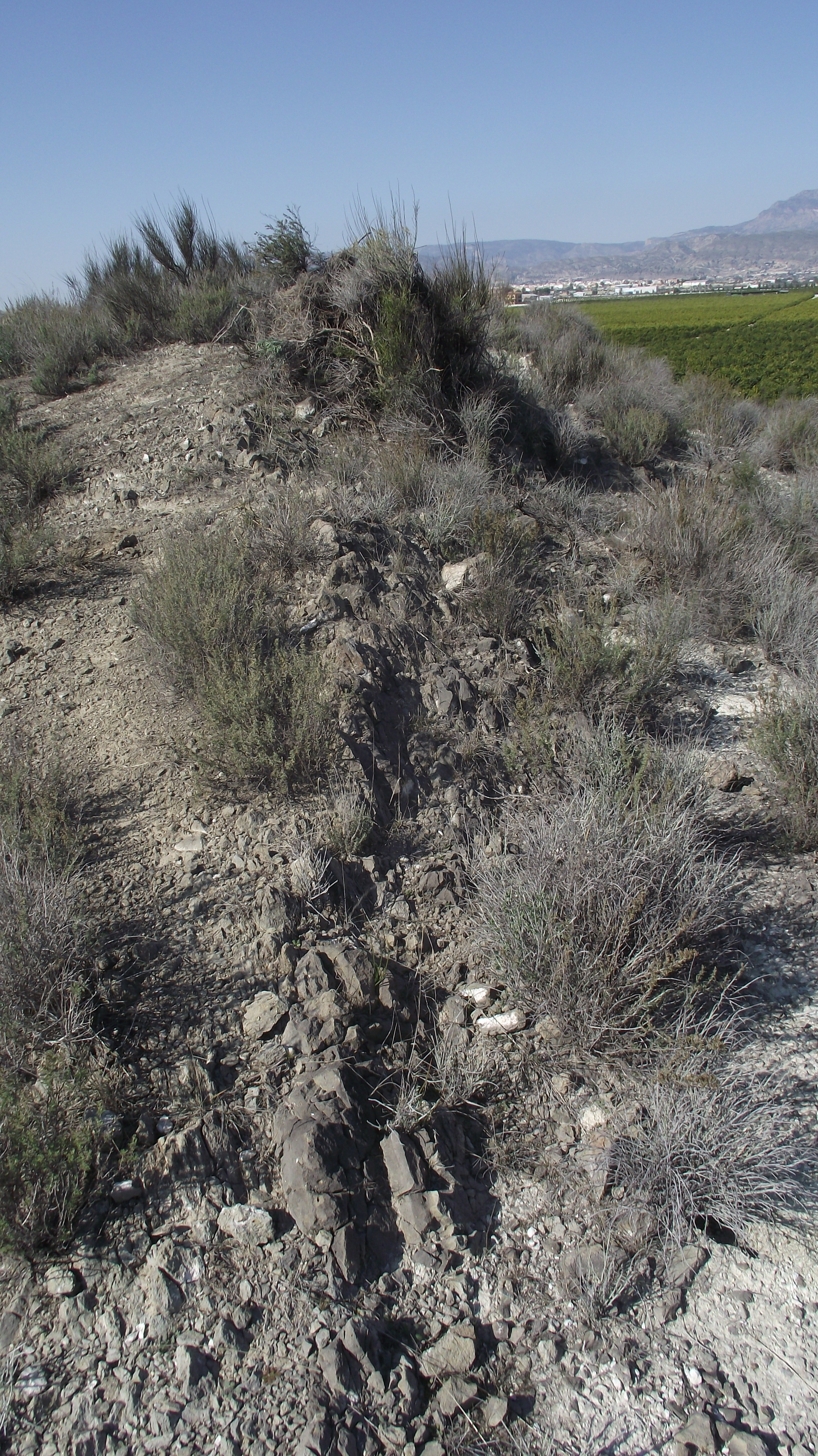 Detalle de los cabecicos